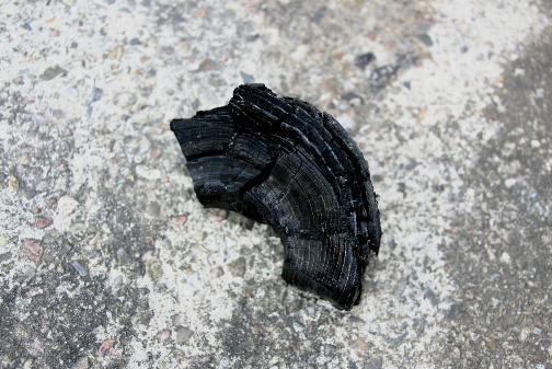 Trækul